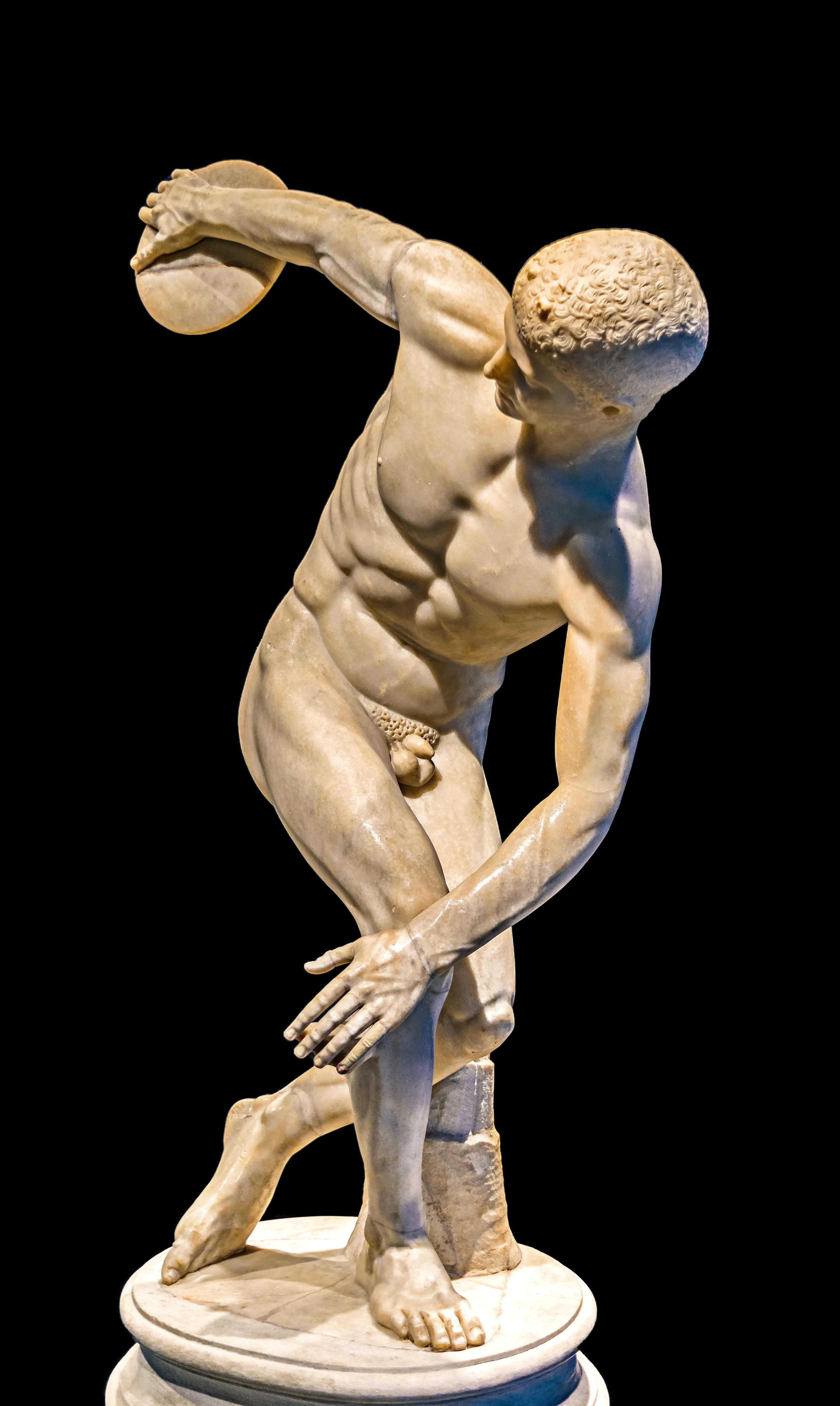 Der sogenannte Diskobolos Lancelloti, eine aus dem 2. Jahrhundert gefertigte römische Marmorkopie, die 1781 auf dem Esquilin gefunden wurde und im Nationalmuseum Palazzo Massimo in Rom ausgestellt ist (Inv. 126371). Bei dem Original handelt es sich um eine verlorene Bronzestatue des griechischen Bildhauers Myron aus dem 5. Jahrhundert v. Chr.